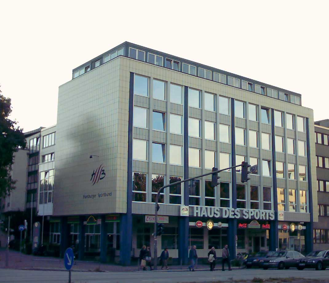 Hamburger Sportbund: Haus des Sports, Hamburg-Eimsbüttel, Schäferkampsallee. Architekt: Ferdinand Streb.